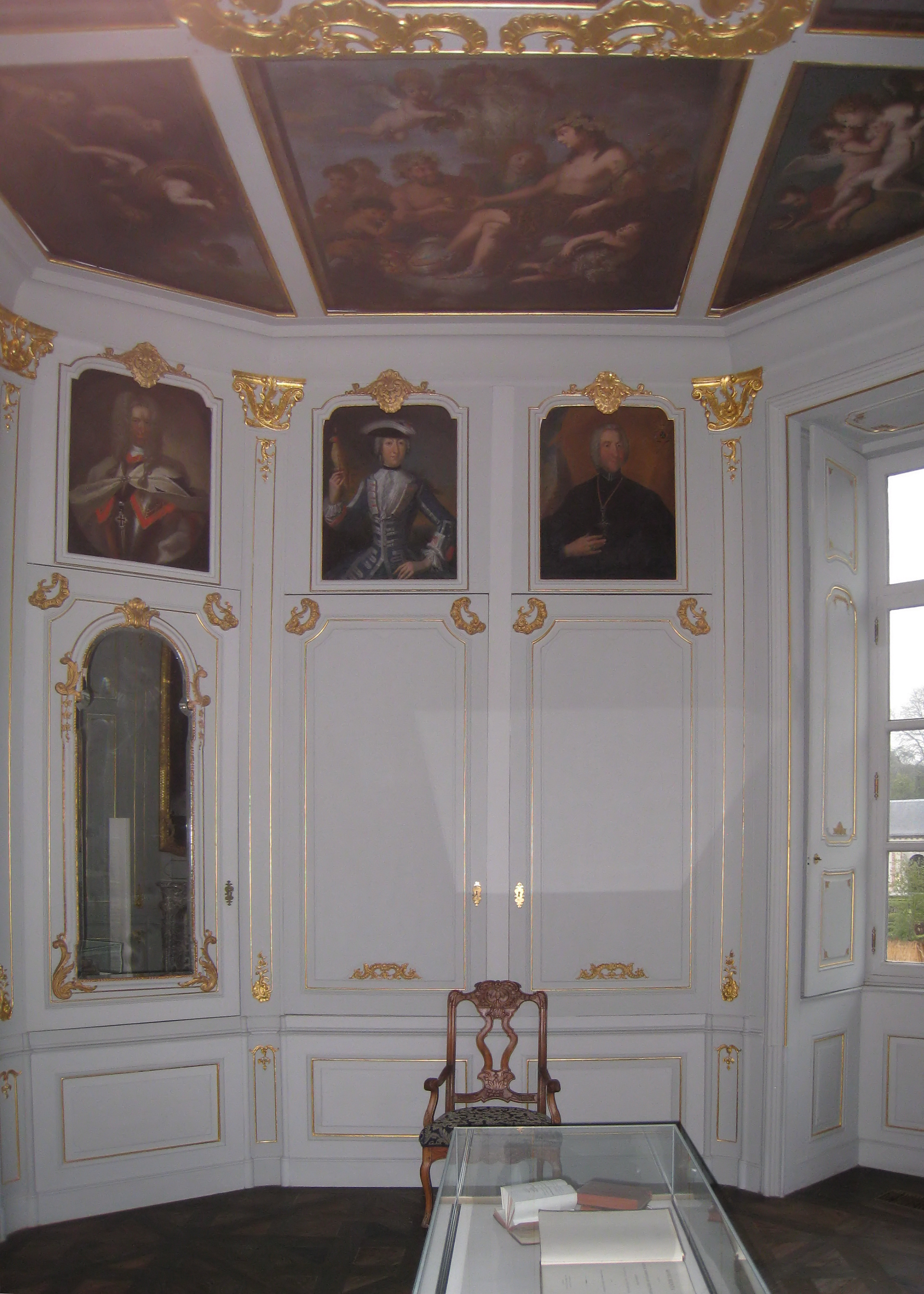 Bibliothek im Schloss Alden Biesen